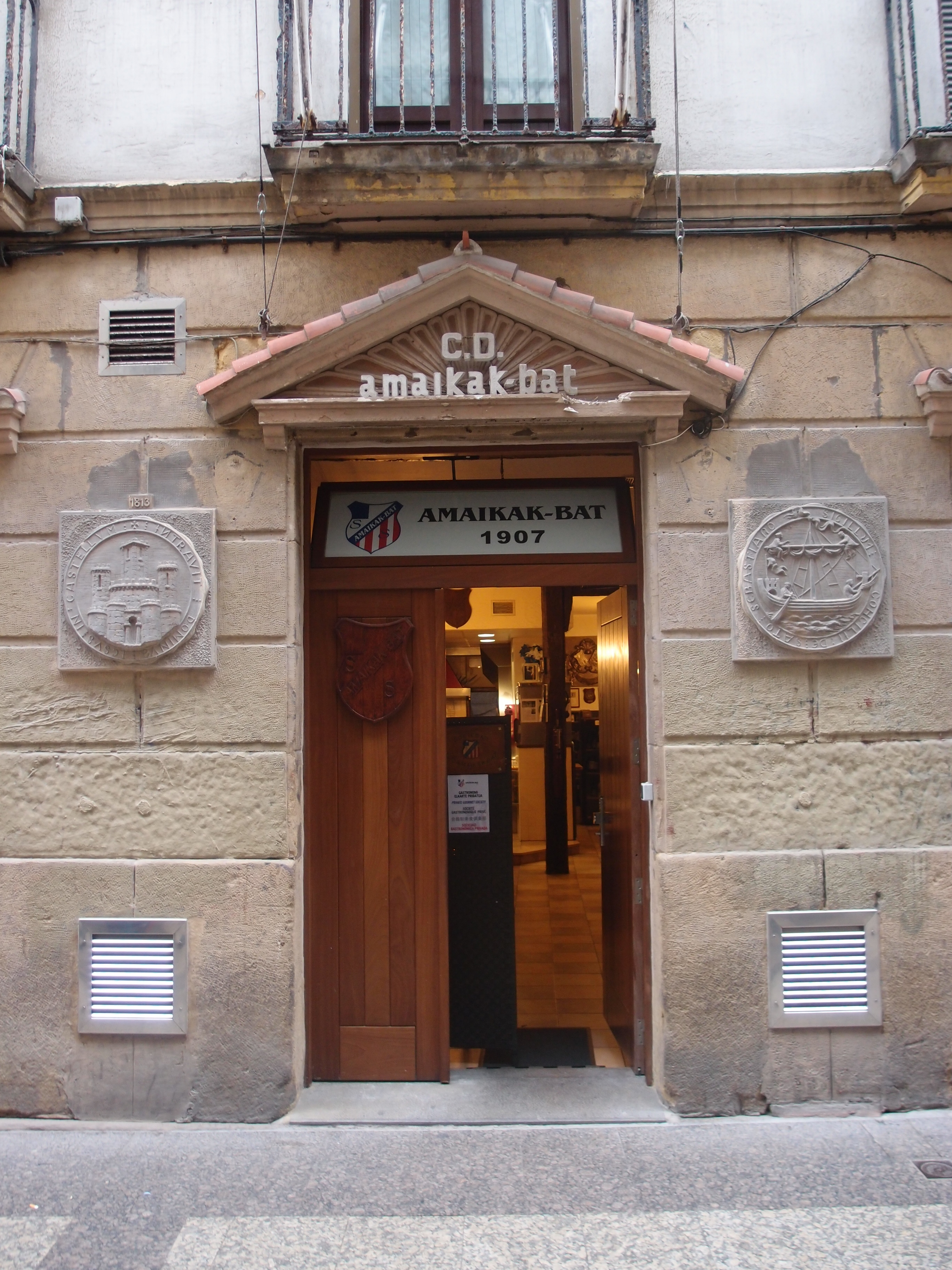 Sociedad Gastronómica "Amaikak-Bat" in Donostia - San Sebastian Datum: 10.05.2014 Urheber: M. Pfeiffer alias Gordito1869 Quelle: Privates Fotoarchiv des Urhebers